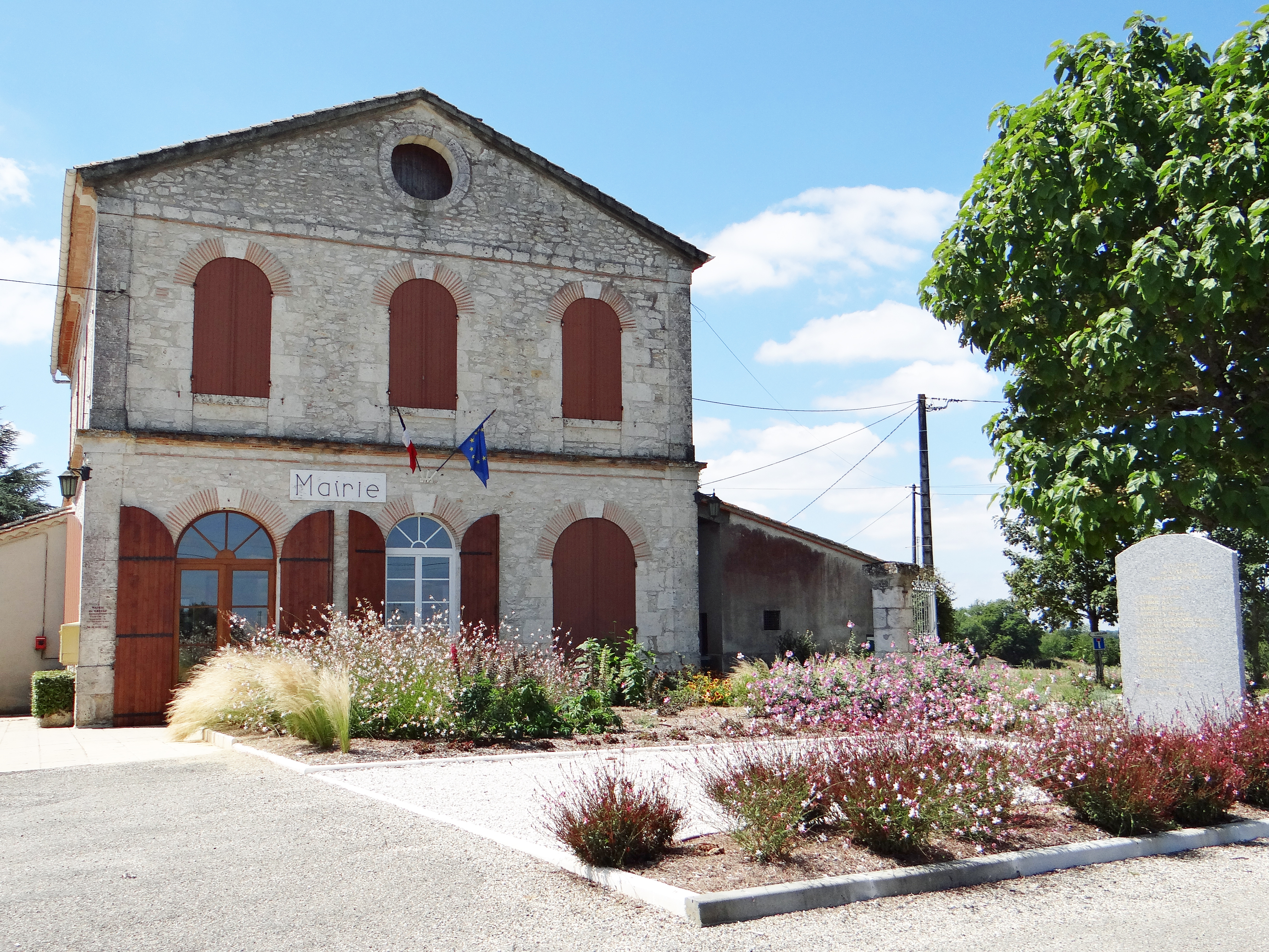 Cauzac - Mairie